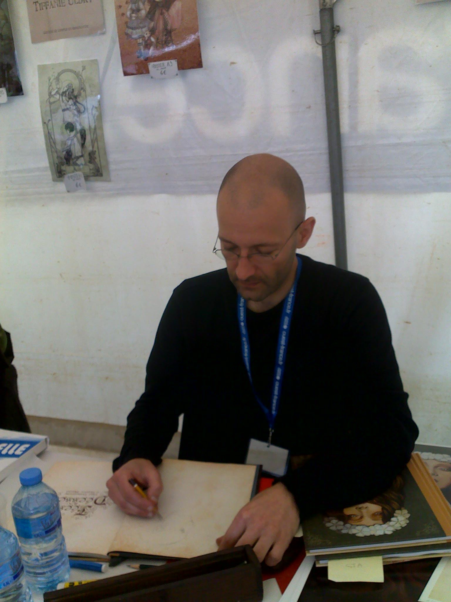 Le dessinateur français Erlé Ferronnière à Comper en juillet 2011